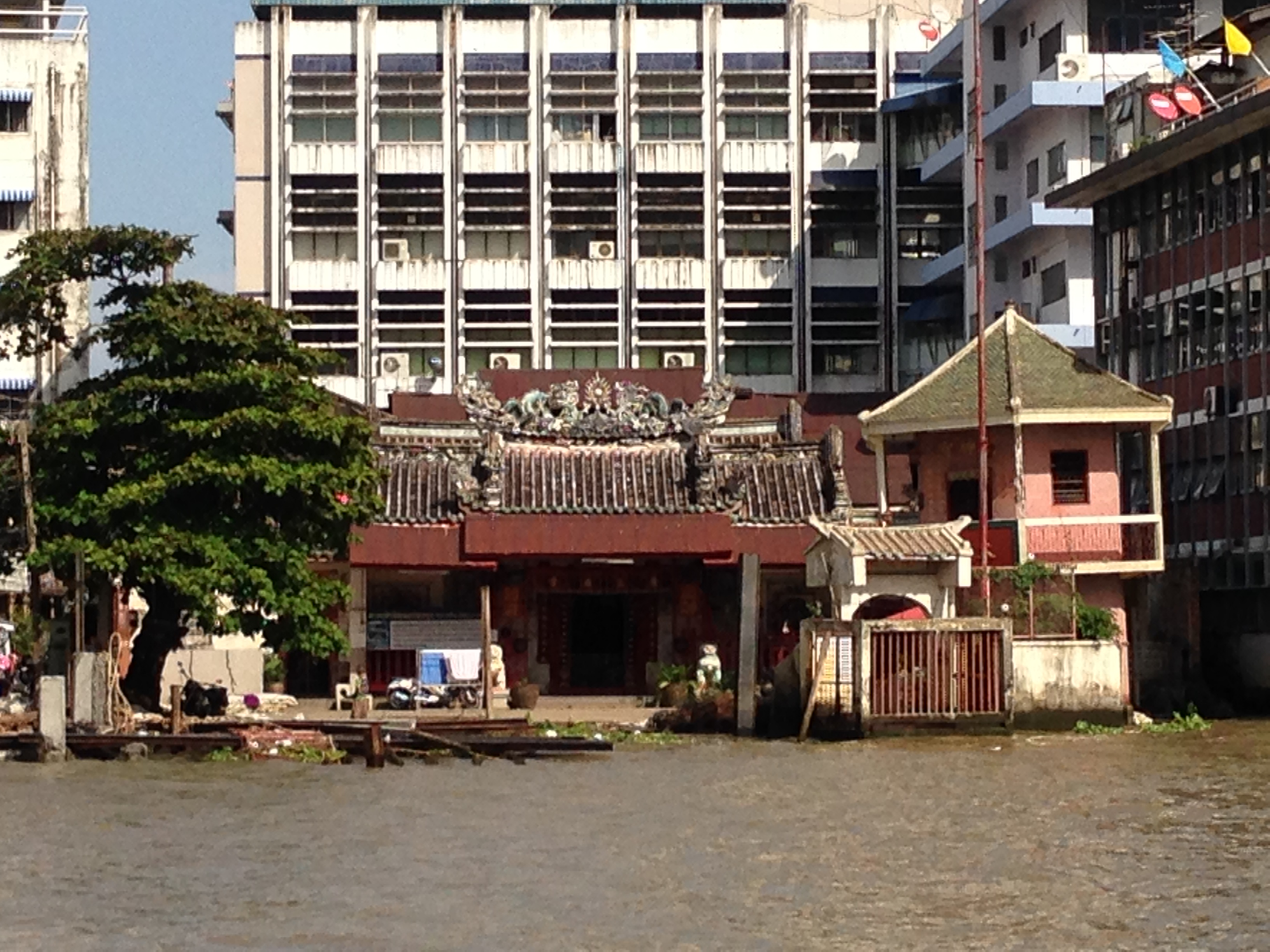 Rong Kuak Shrine, talat Noi, Samphanthawong, bangkok Thailand